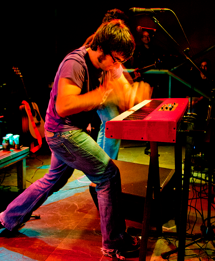 Luis Prado en directo con Señor Mostaza en Murcia